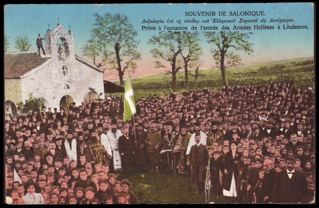 Литохоро, посрещане на гръцката армия в 1912 година